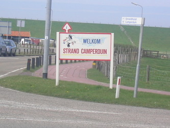 zelf gemaakt foto van camperduin, noord-holland, nederland